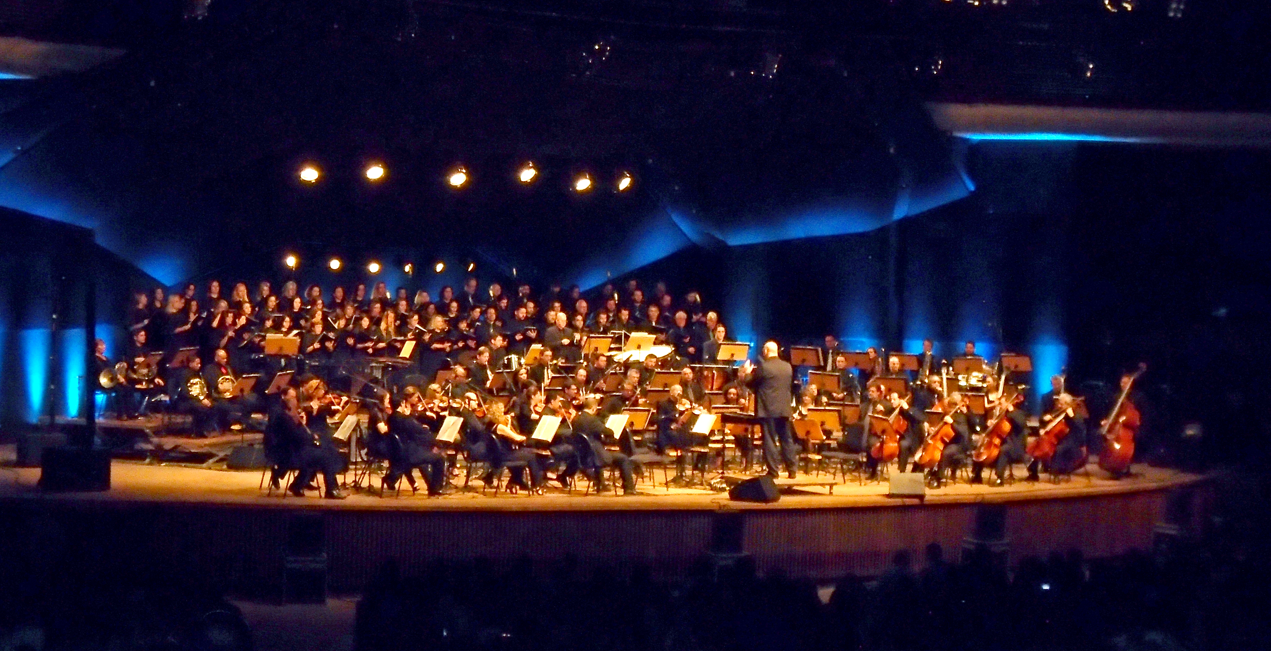 Orquestra Sinfônica de Porto Alegre no Auditório Araújo Viana